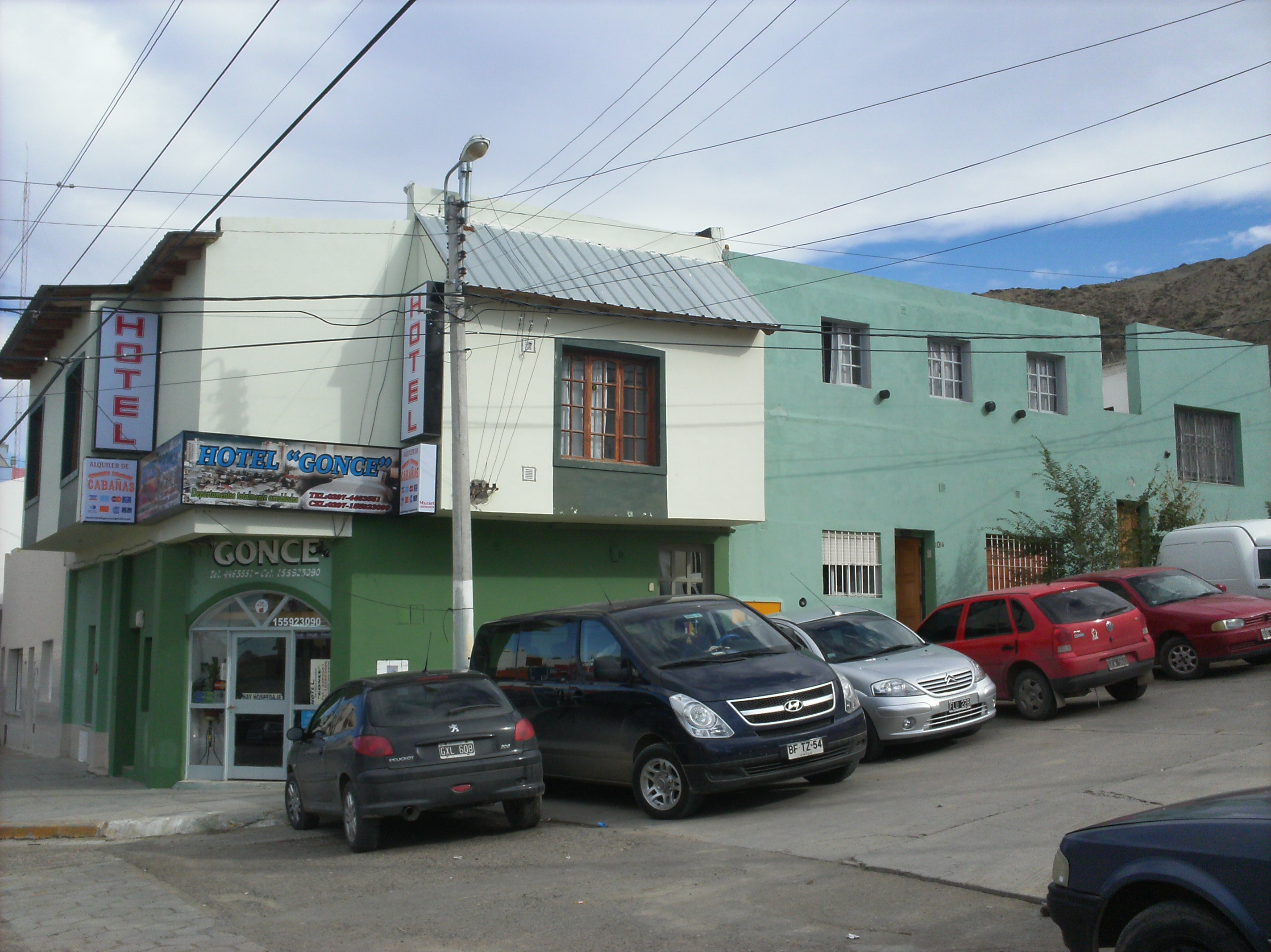 El hotel Gonce en Comodoro Rivadavia, una pyme